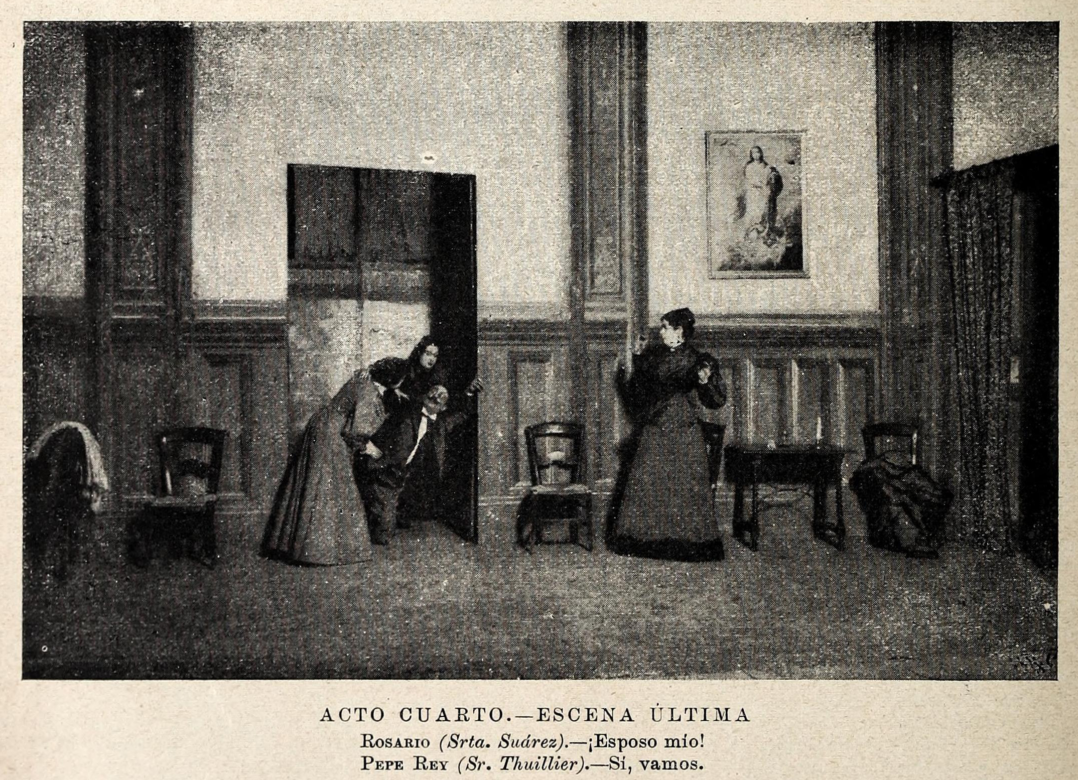 Doña Perfecta, acto cuarto, escena última.